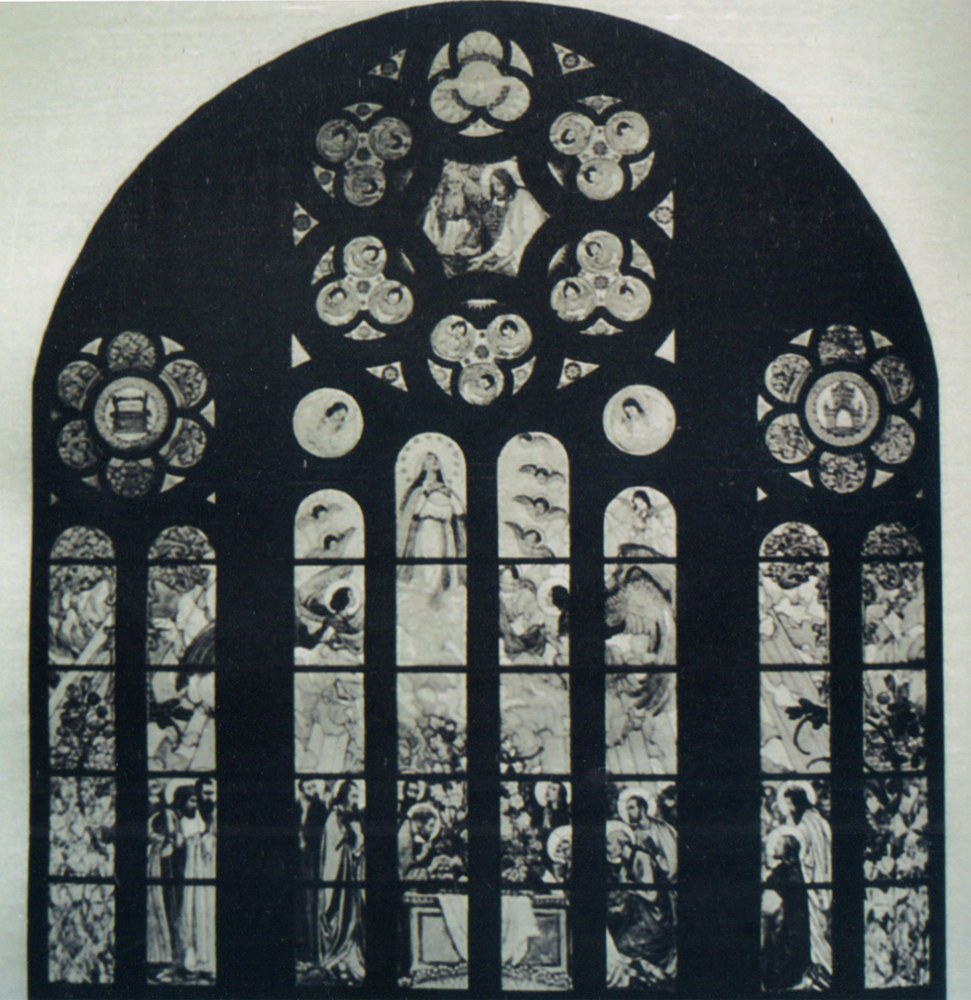 Костел Тернопіль, вітраж Христос благословляє дітей